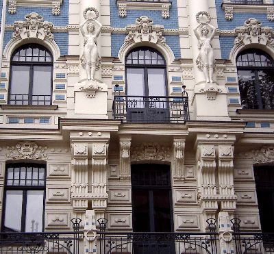 facade de Mikhaïl Eisenstein au 4, rue Strelnieku, à Rīga